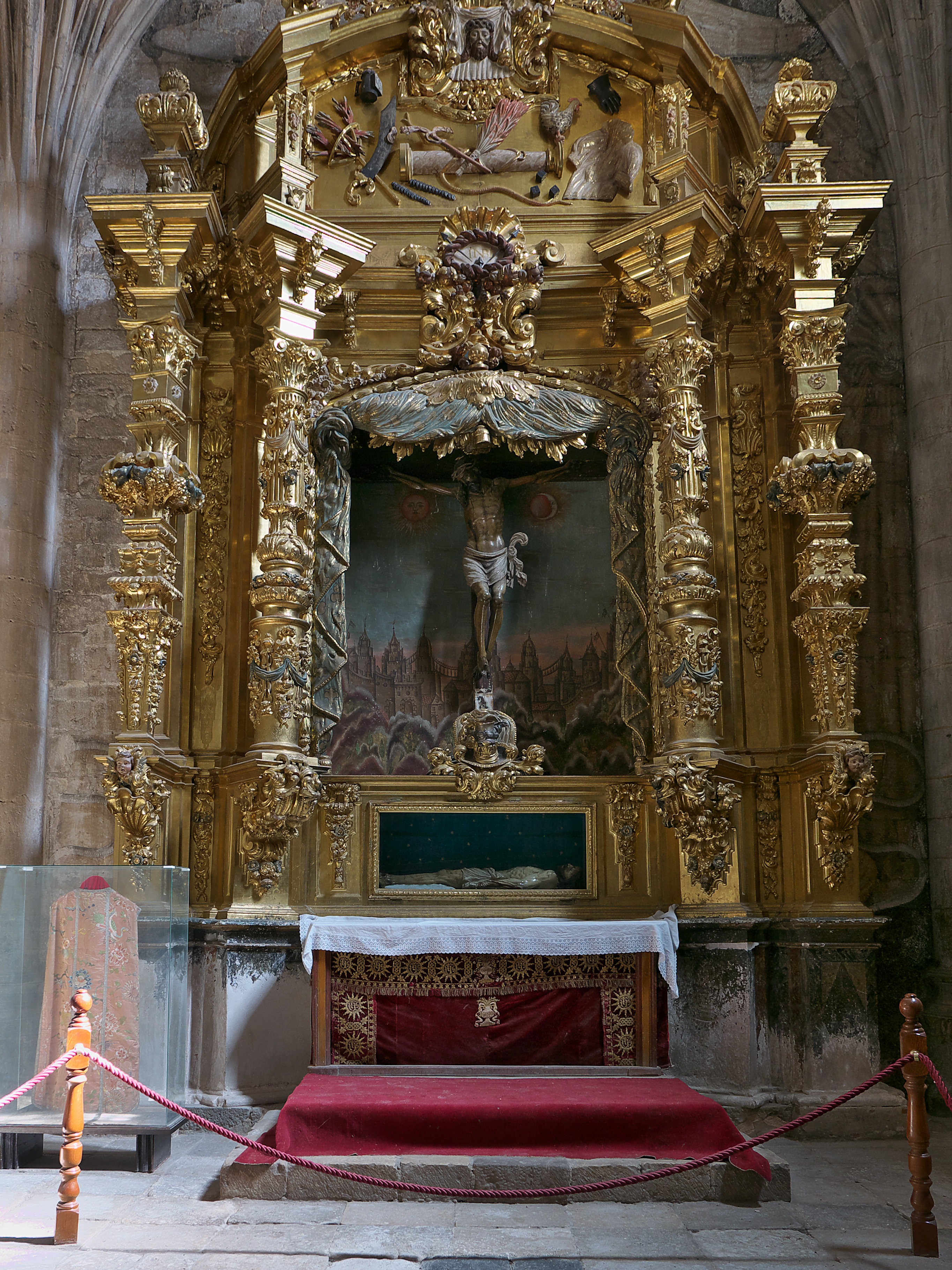 Capilla situada en la cabecera de la Epístola de la Colegiata de Santa María del Mercado (Berlanga de Duero). Capilla funeraria de Fray Tomás de Berlanga (†1551), tercer obispo de Panamá y descubridor de las Islas Galápagos. Esta capilla es llamada vulgarmente, de los Cristos.